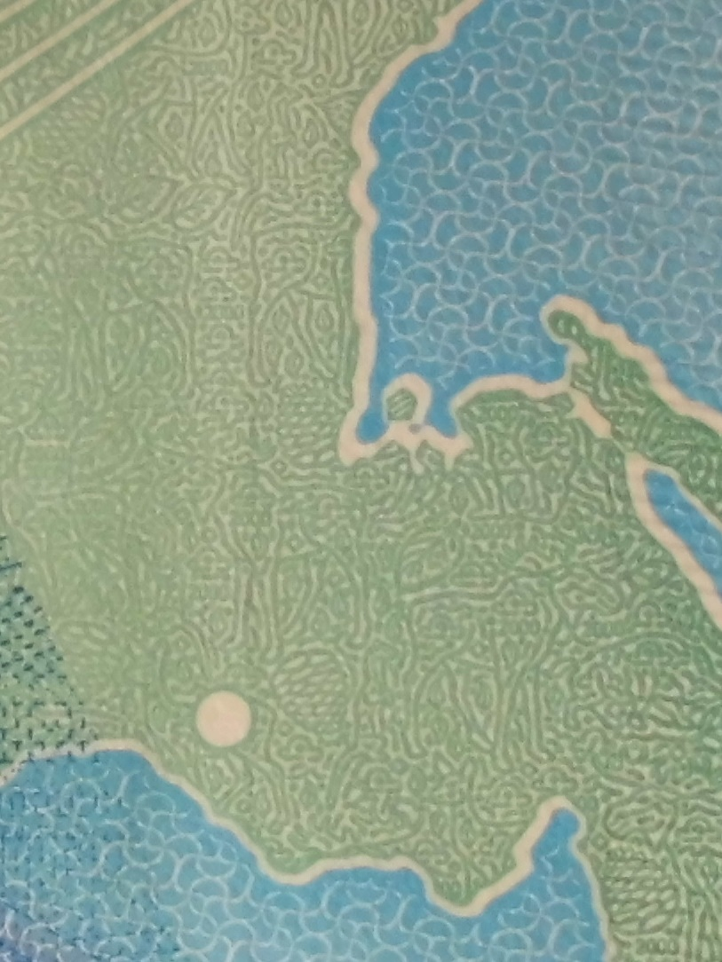 2000 российских рублей образца 2017 года. Реверс, справа. Микротекст (2000), микрорисунки животных и растений